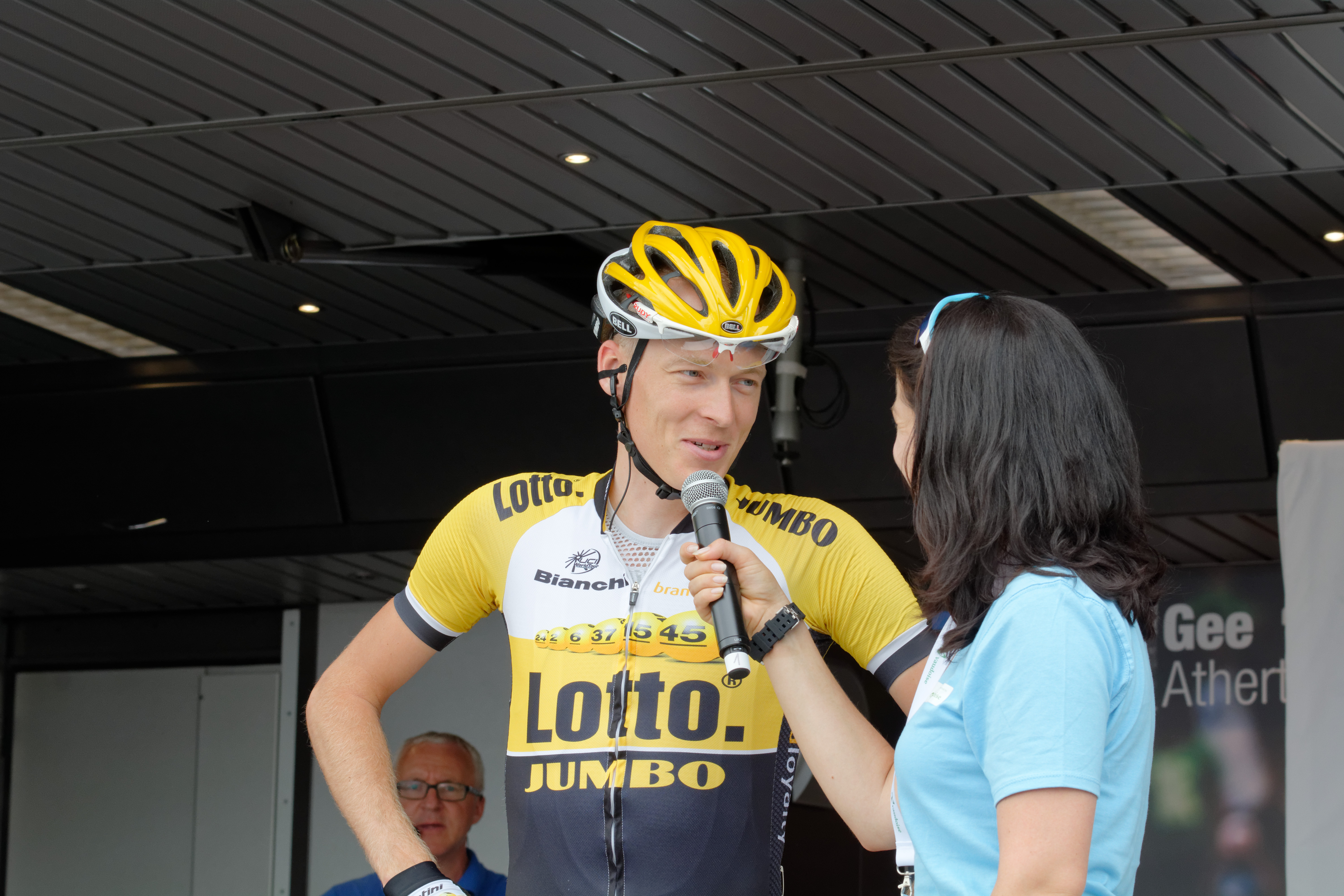 D71_9861_DxO